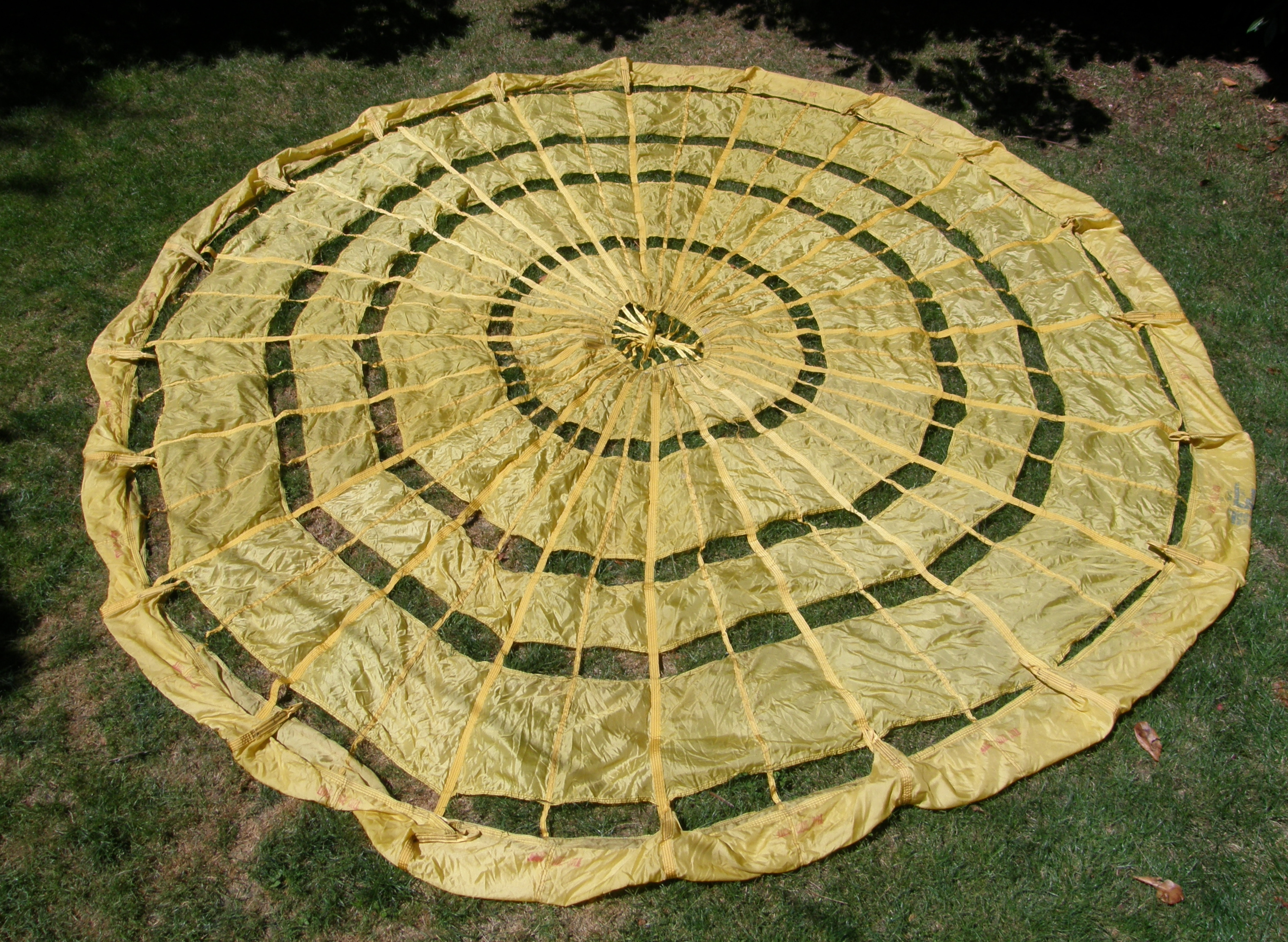 ausgebreiteter Bremsschirm mit 20 Leinen/Felder, evtl. auch Lastenschirm?